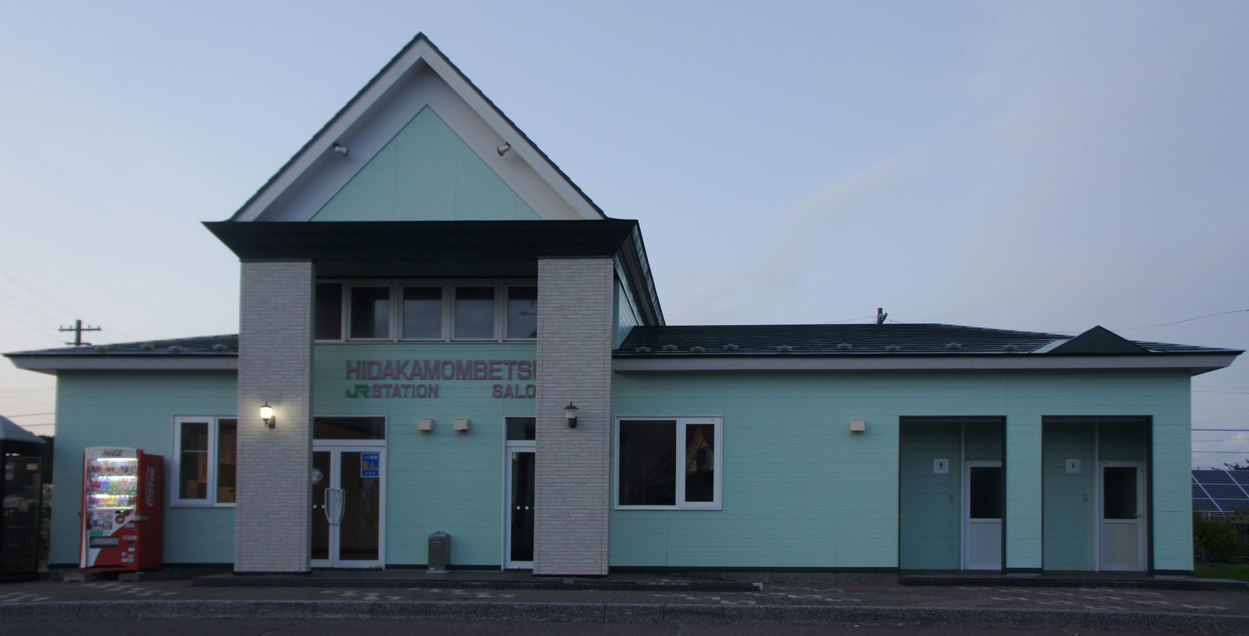 JR日高本線・日高門別駅の駅舎